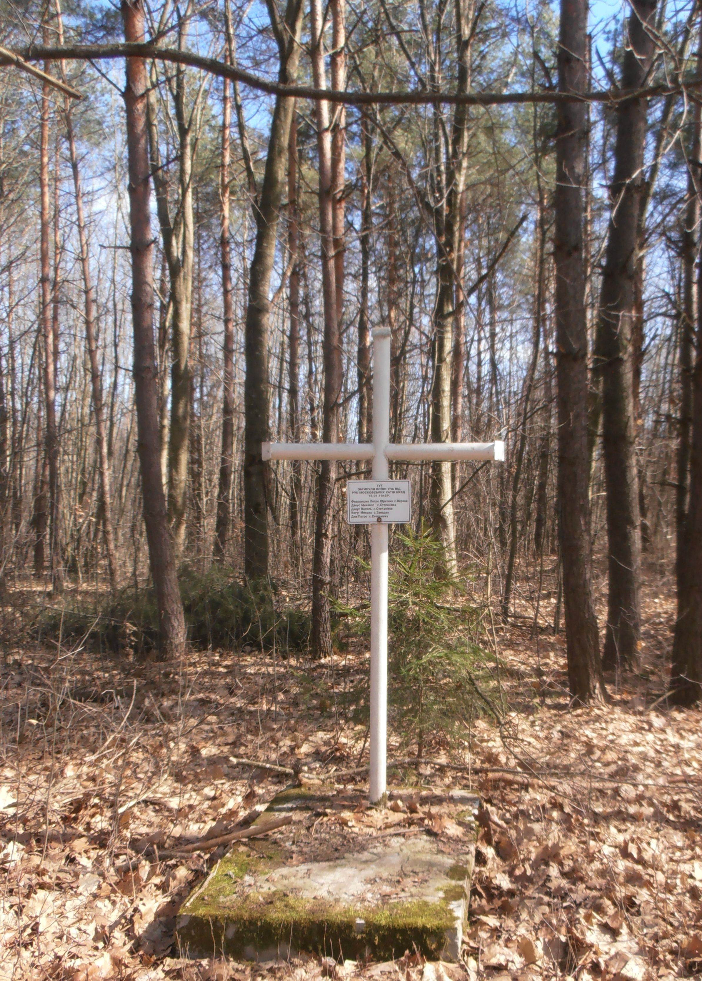 Хрест повстанцям УПА у Стефанівці